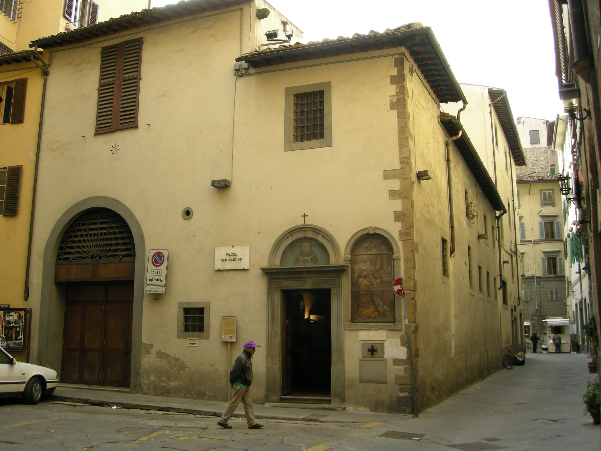 Oratorio dei buonomini di s. martino, ext